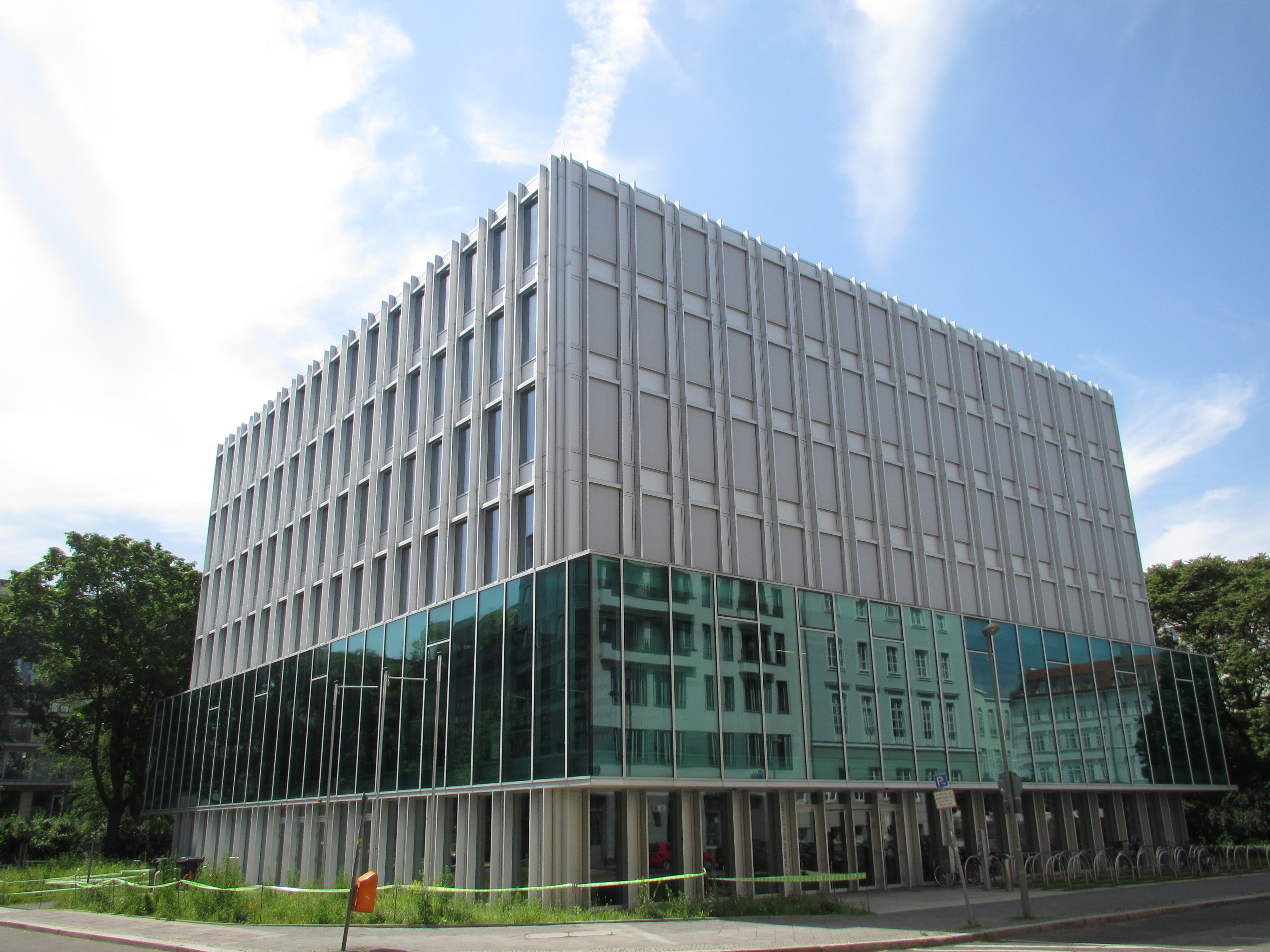 Zentrale der Heinrich-Böll-Stiftung, 10117 Berlin, Schumannstaße 8, am 31.05.2014